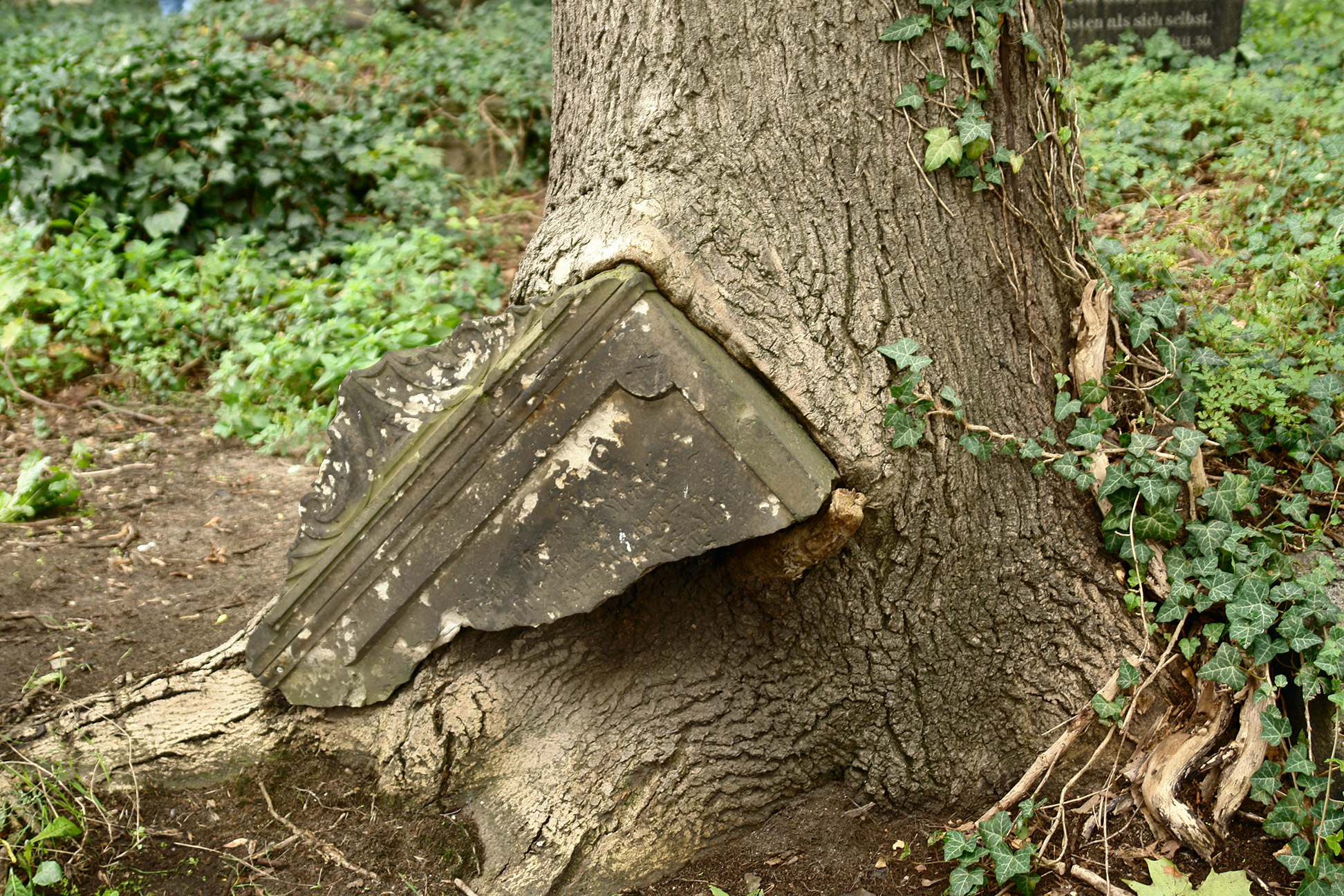 Bruchstück eines Grabsteins eingewachsen in einen Baum